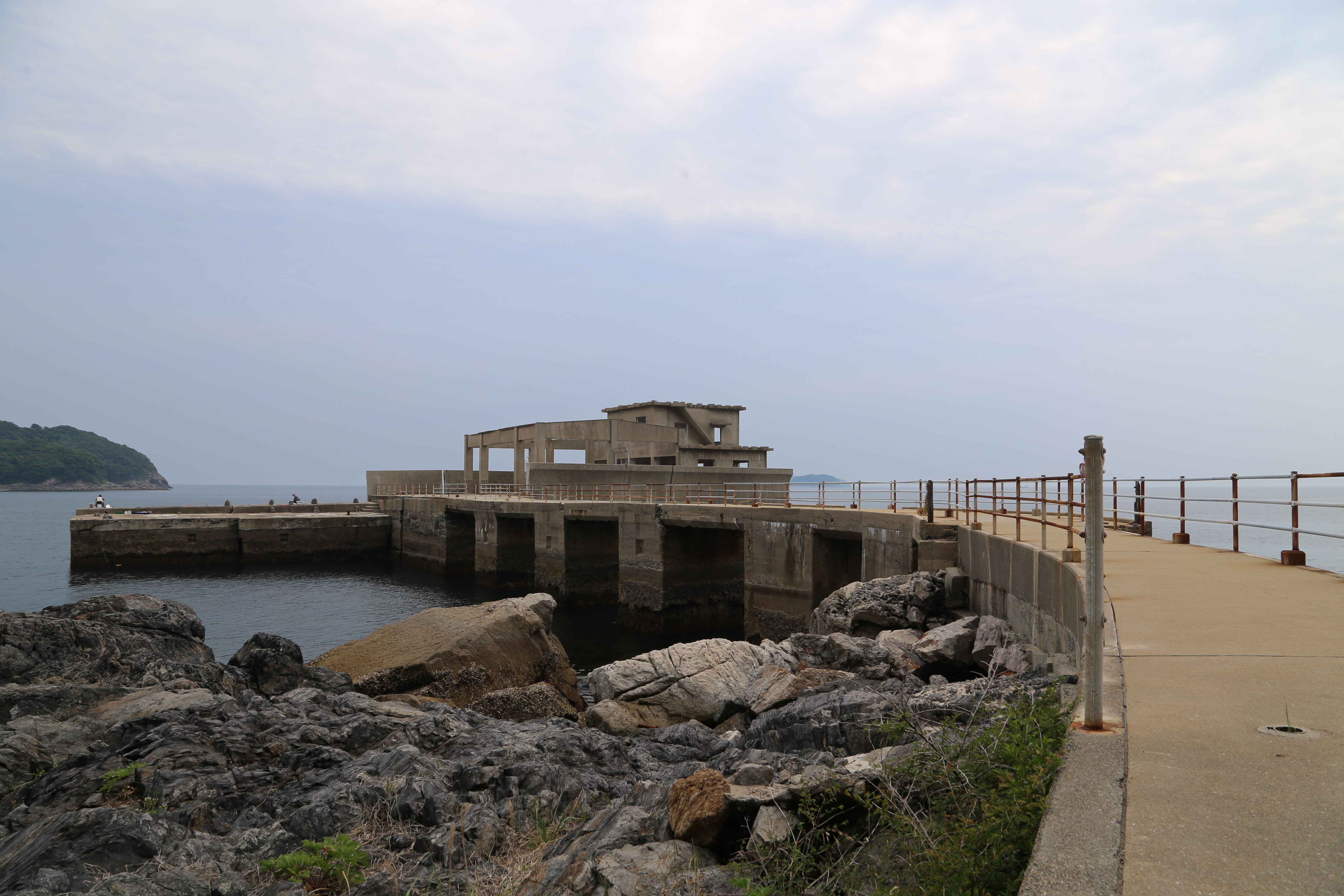 山口県周南市沖の大津島にある、人間魚雷回天の実験にも使われた魚雷実験場